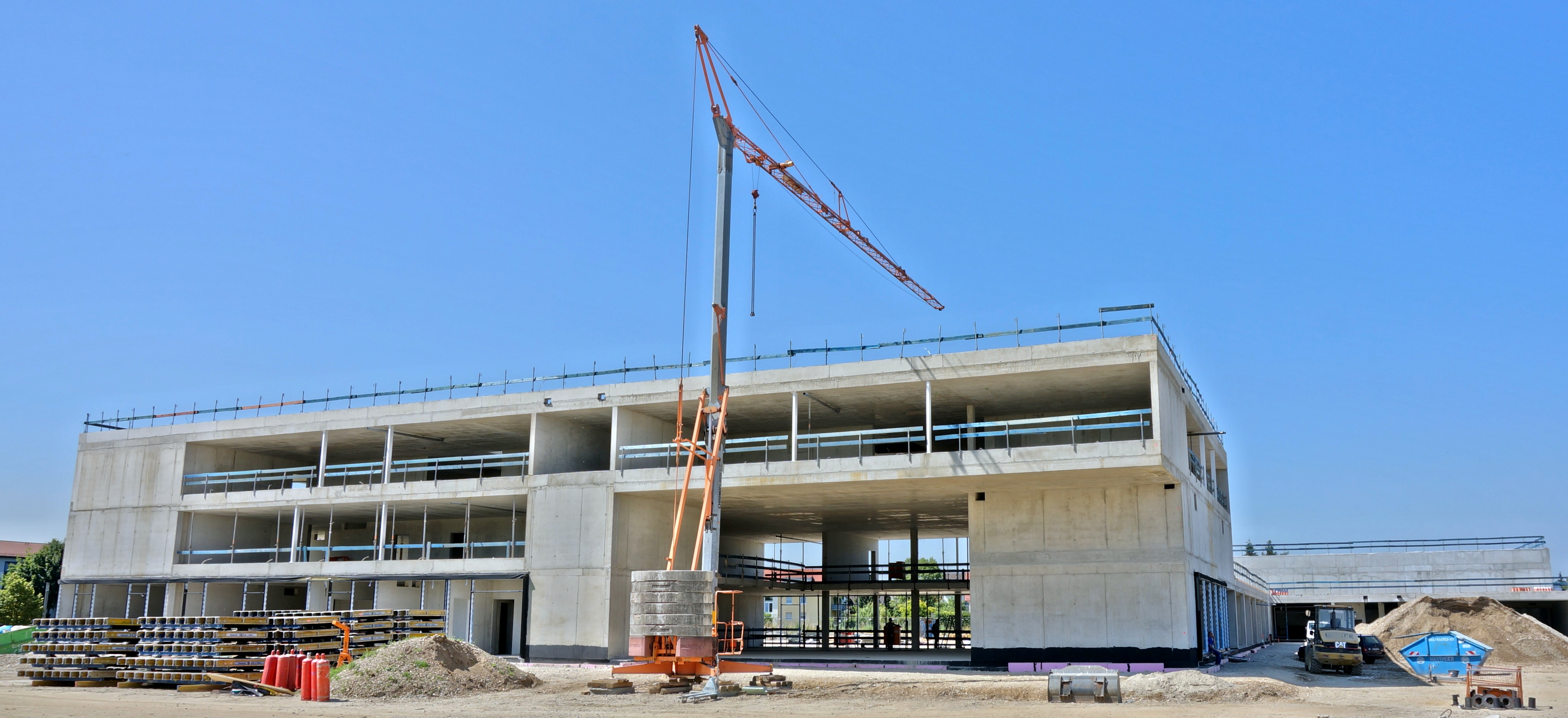 Deutschland, Bayern, Oberbayern, Landkreis Fürstenfeldbruck, Gemeinde Olching, Mittelschule mit Mehrfachturnhall im Schwaigfeld im Juli 2013, ein Jahr nach dem offiziellen Spatenstich, geplante Fertigstellung im Frühjahr 2014